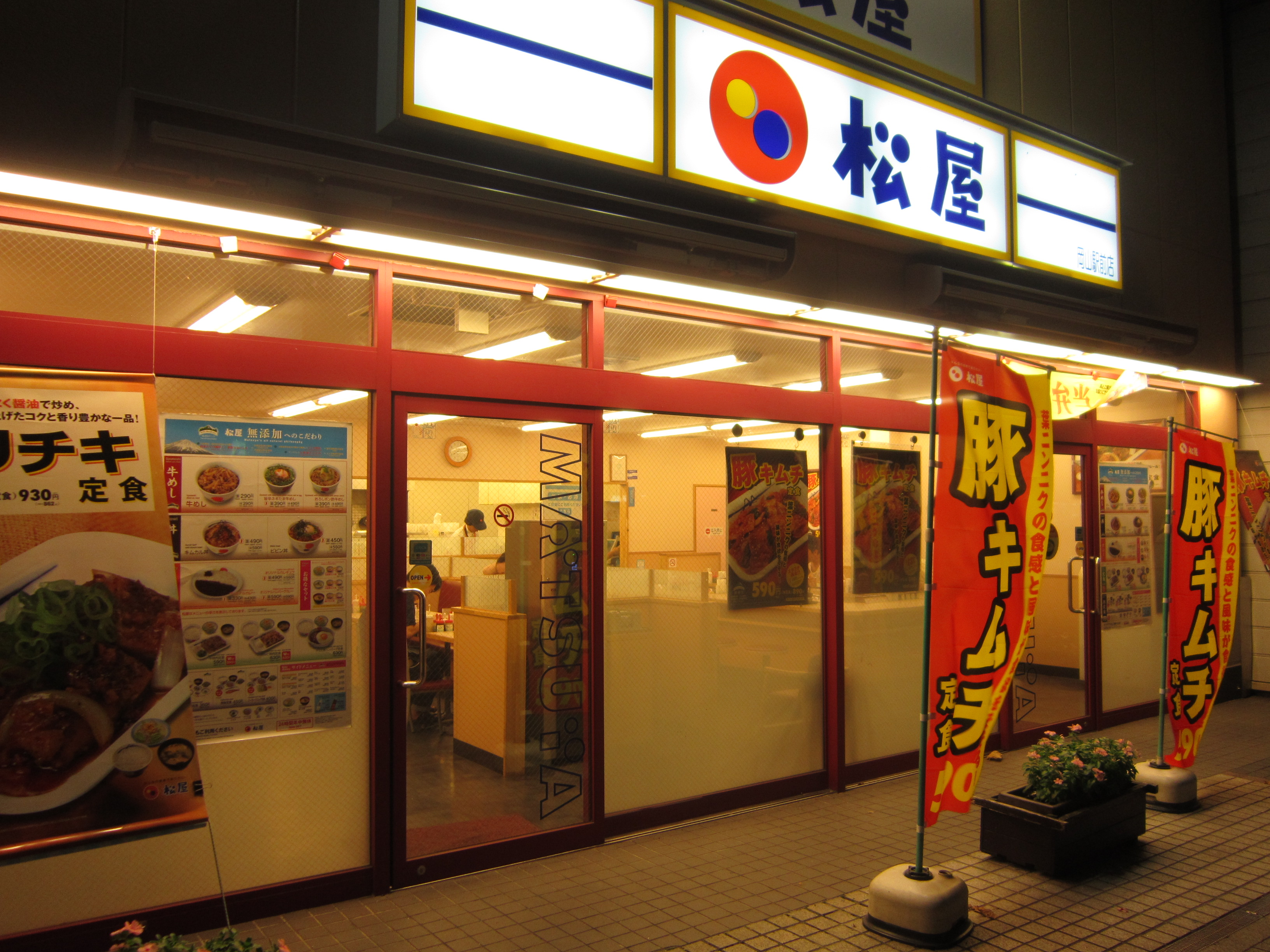 松屋 岡山駅前店中文（台灣）: 一間位於岡山市的分店